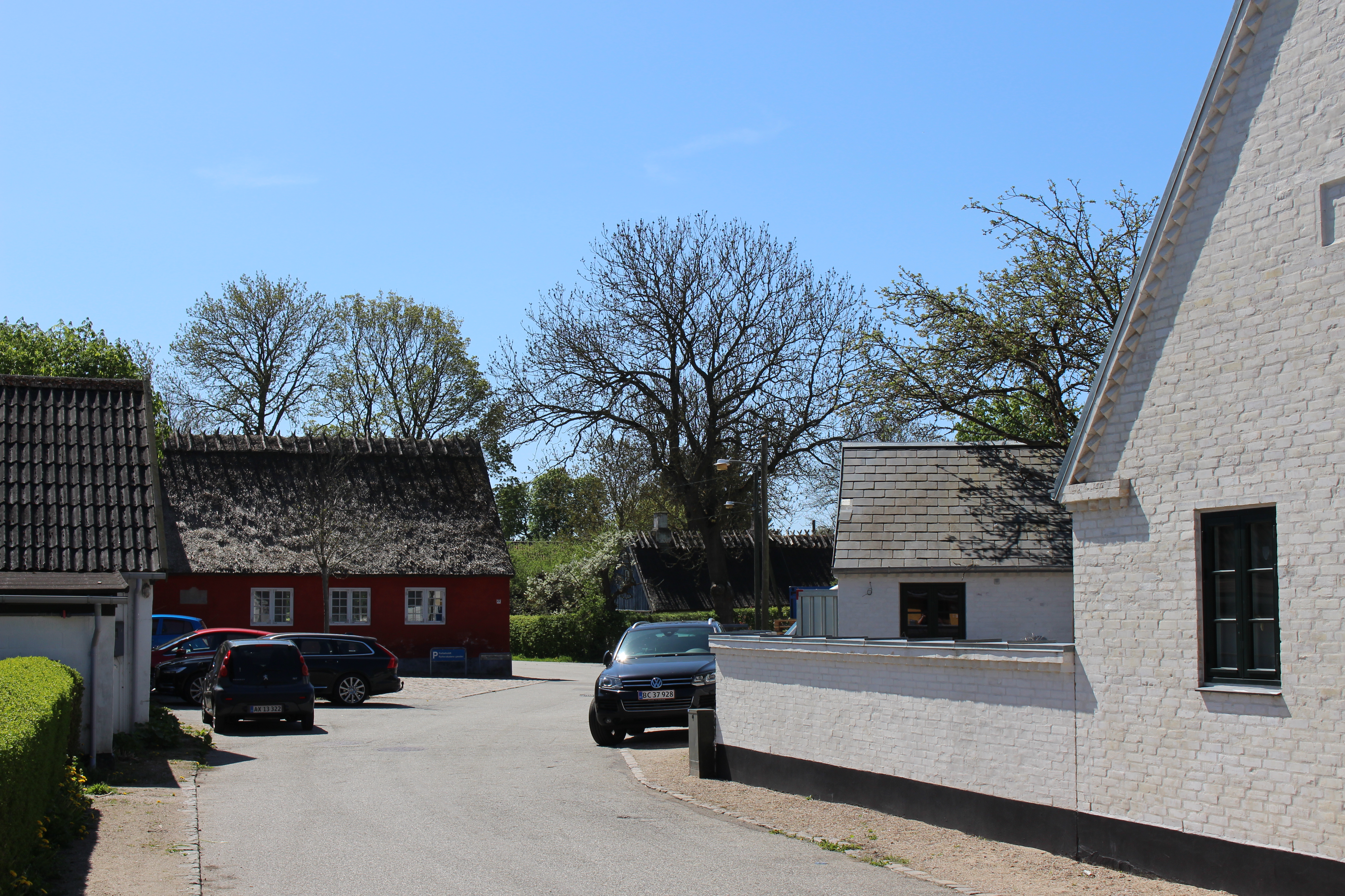 Herstedvester landsby